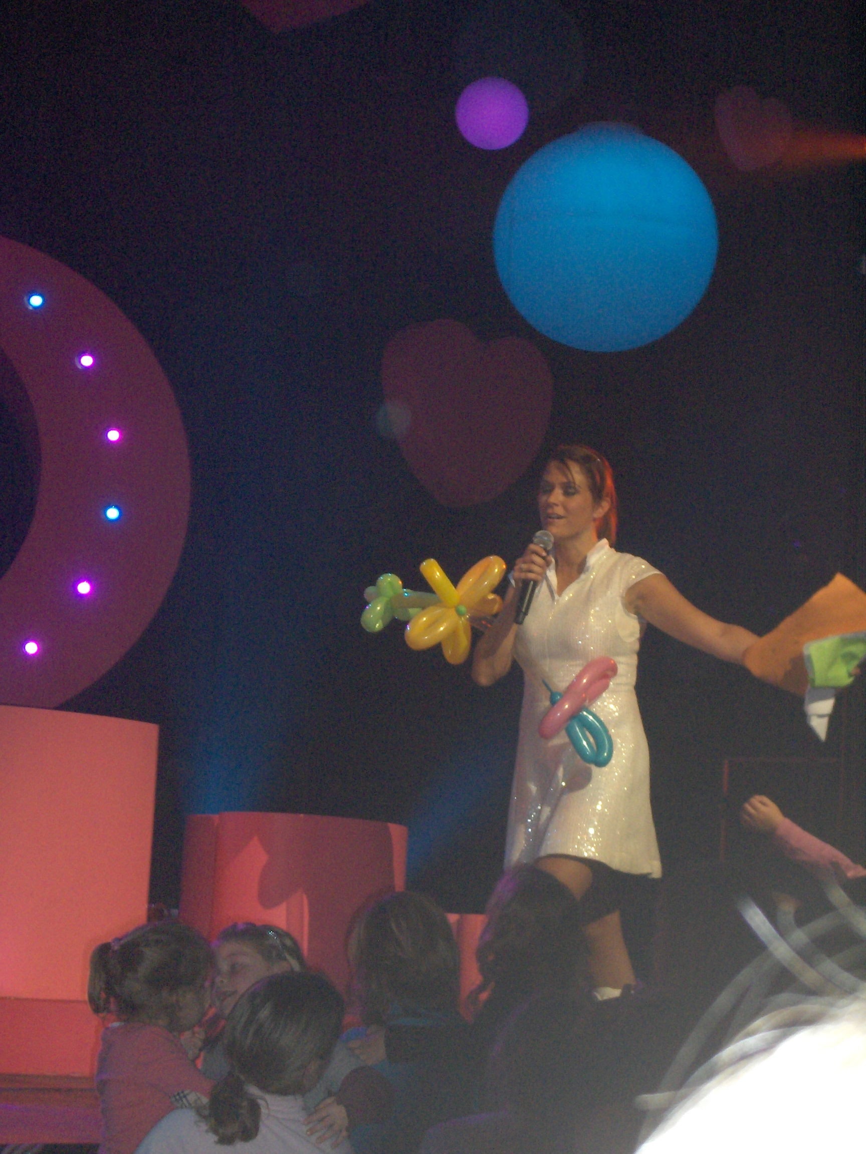 Karen Damen, singer in the Belgium group K3